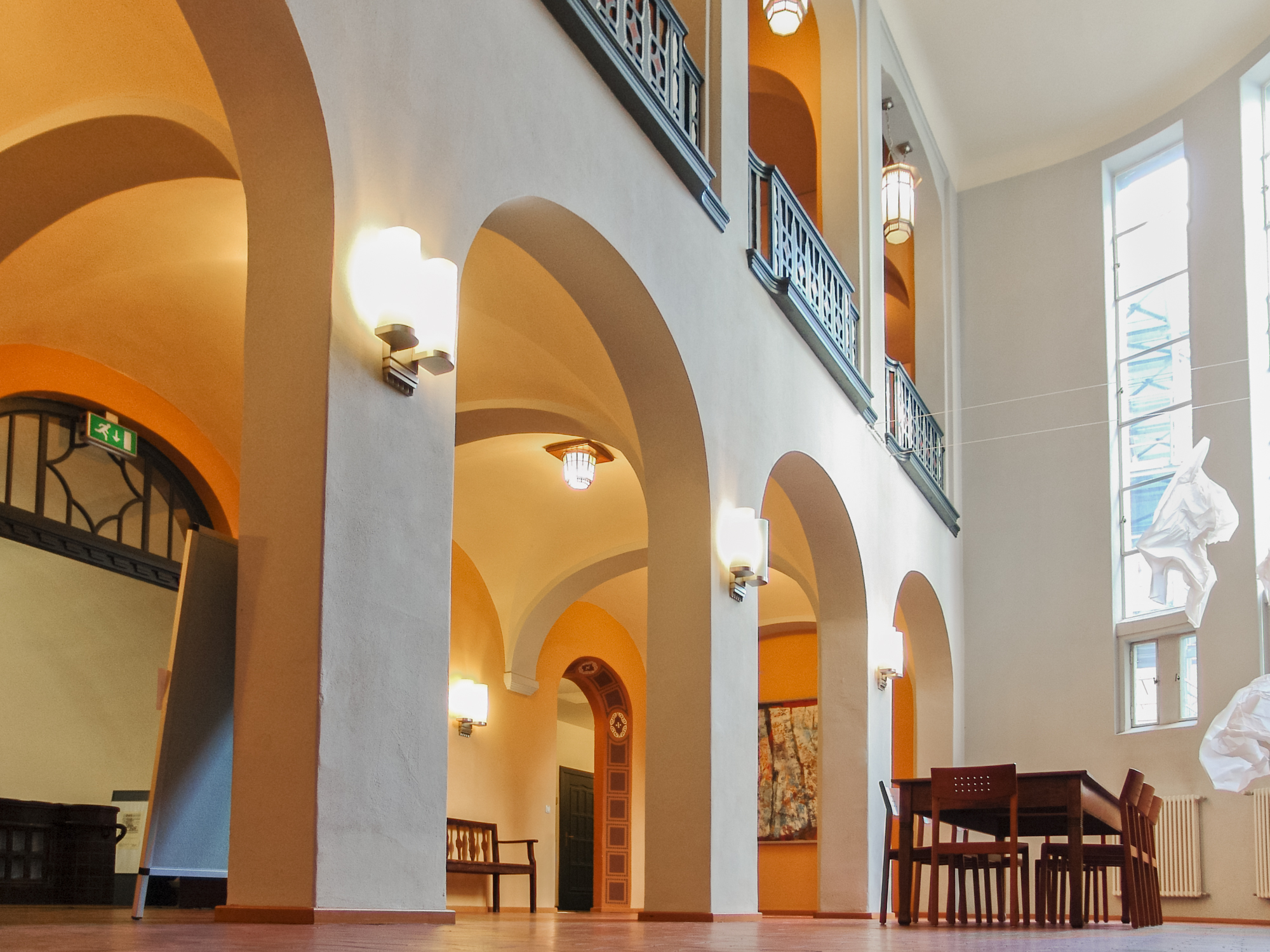 Geschwister-Scholl-Haus, erbaut 1908–1910.